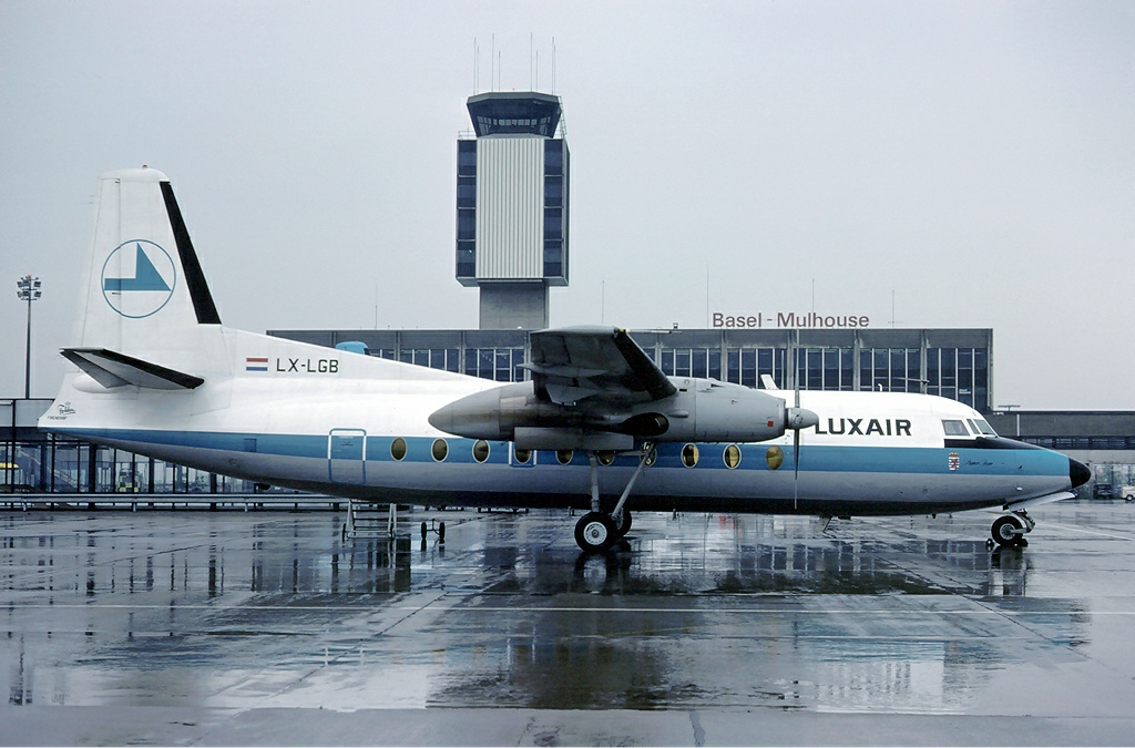 Luxair Fokker F-27-100 Friendship